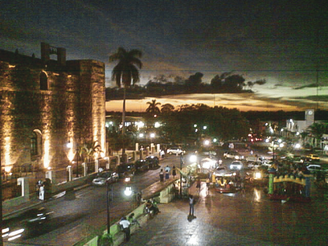 La ciudad de Tizimín vista de noche.